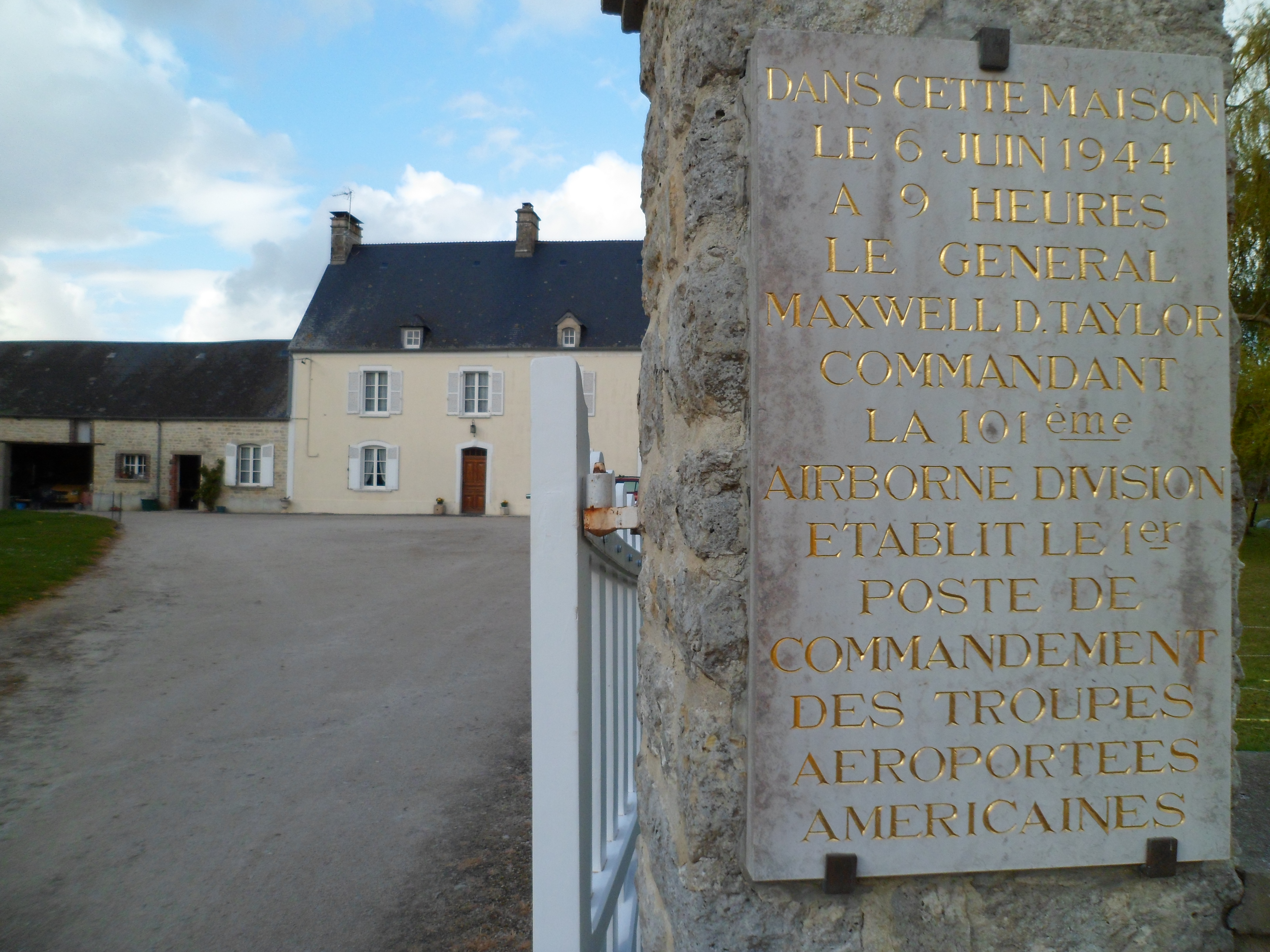 Hiesville